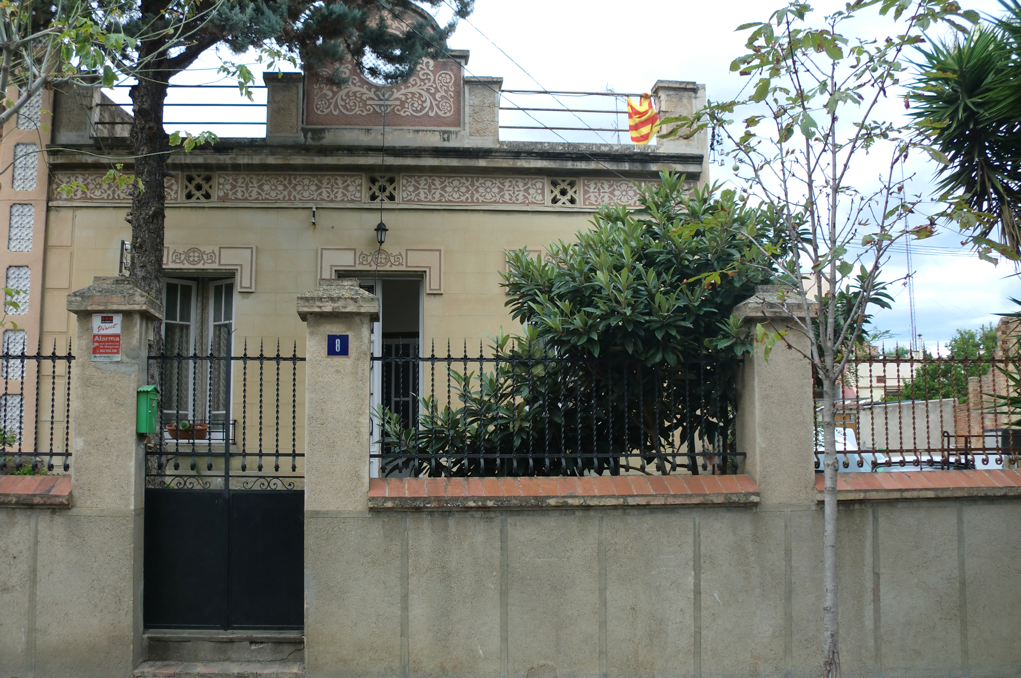 Casa a la via Emporitana (Figueres)